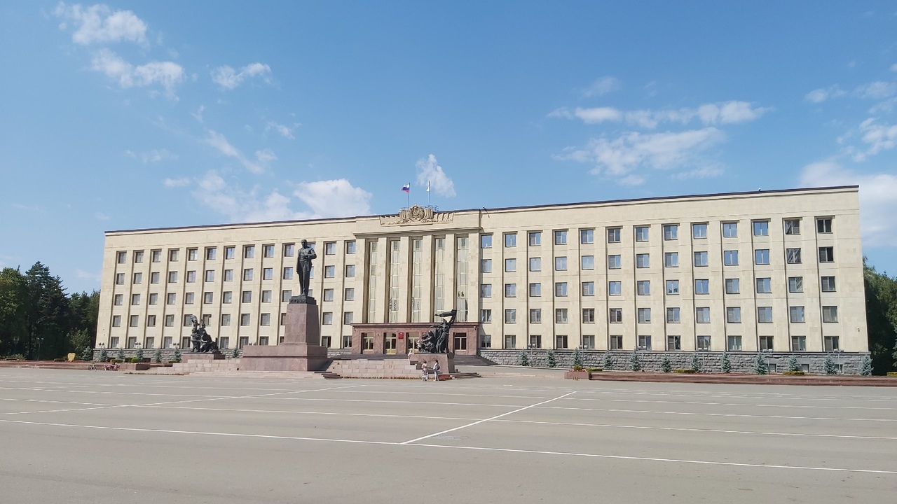 Администрация Ставрополя